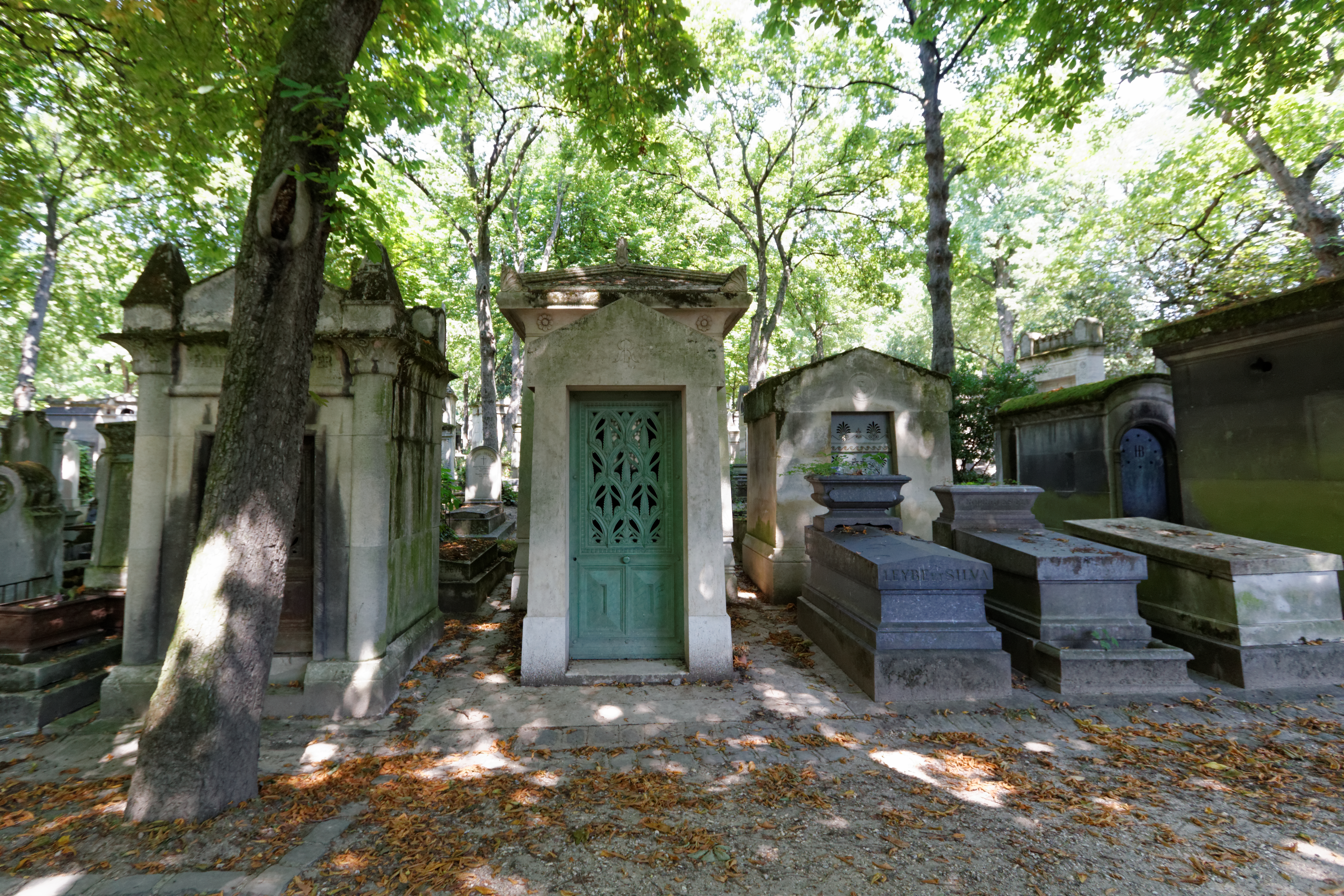 Sépulture de la famille Rothschild comportant entre autres : James de Rothschild (1792-1868), Charlotte de Rothschild (1825-1899), Arthur de Rothschild (1851-1903), Mayer-Alphonse-James Rothschild (1827-1905), Edmond de Rothschild (1845-1934), James Gustave Jules Alain de Rothschild (1910-1982). A l'origine, monument en forme de chapelle cubique, toit à quatre pans, porte en bronze de style grec, lettre R gravée sur le fronton. Le monument a depuis été agrandi pour rejoindre l'avenue Rachel.